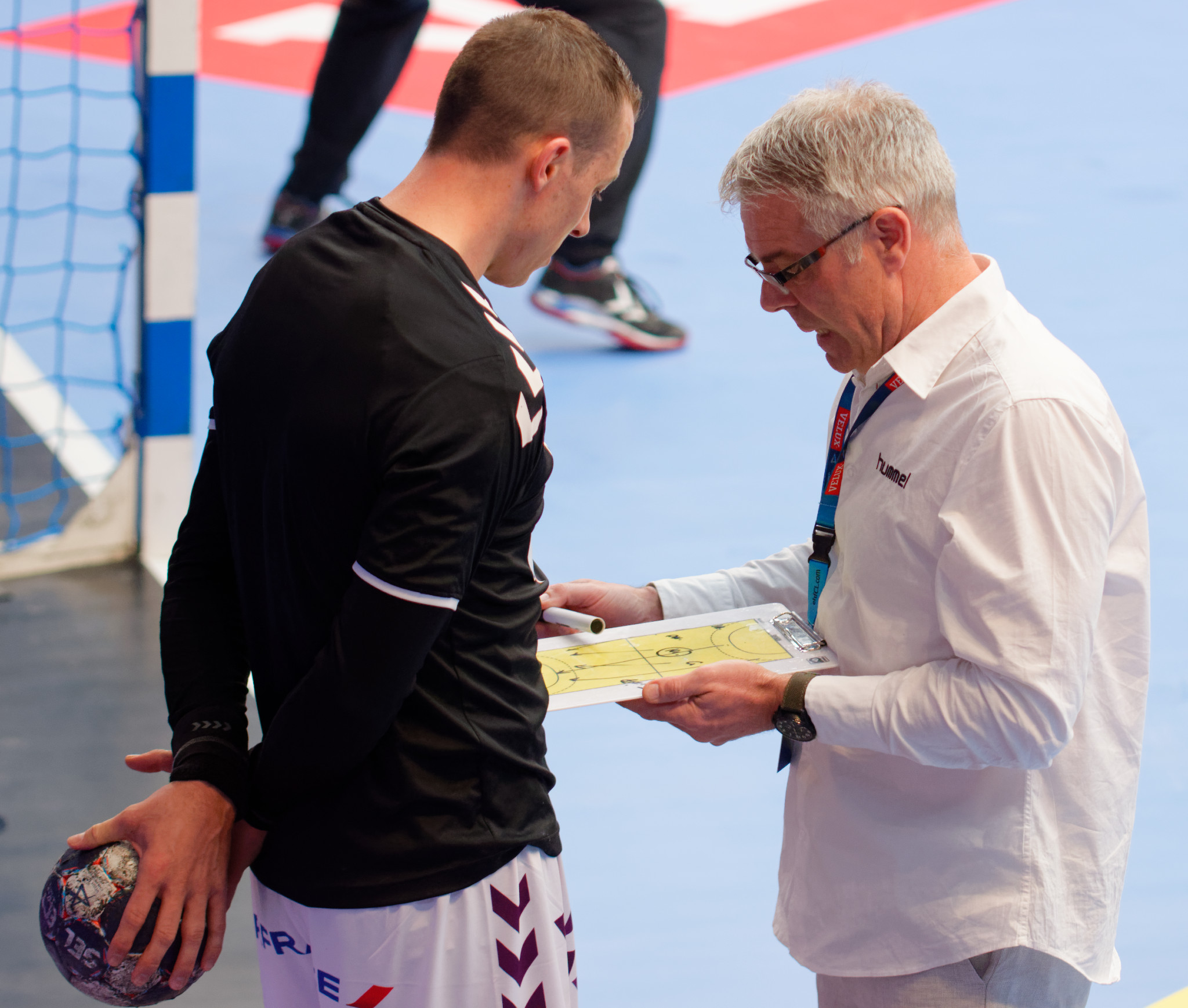 Huitième de finale de la ligue des champions 2016-17 entre le PSG et le HBC Nantes. A Coubertin, le 1er avril 2017.